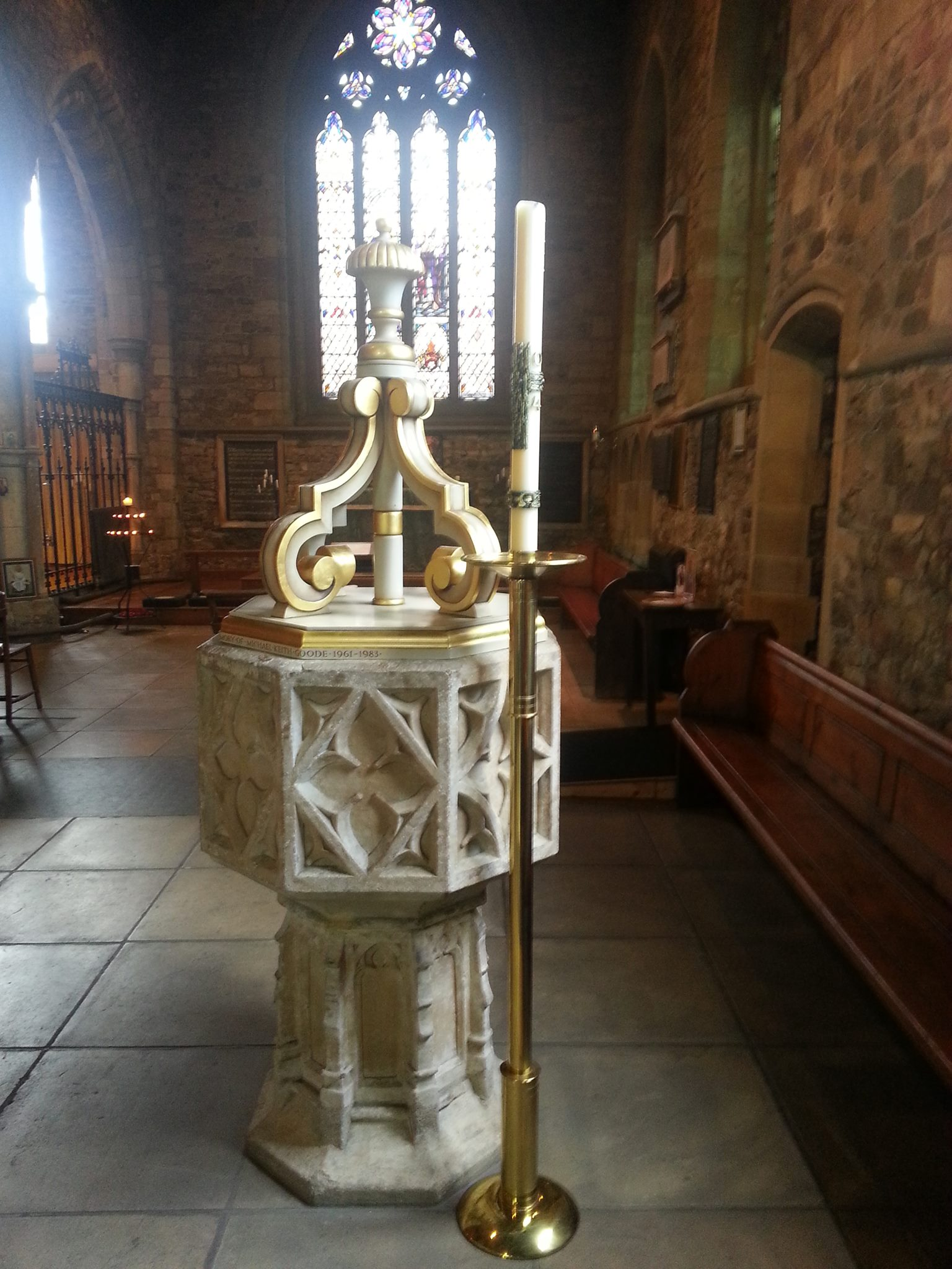 Wnętrze kościoła od prawej strony